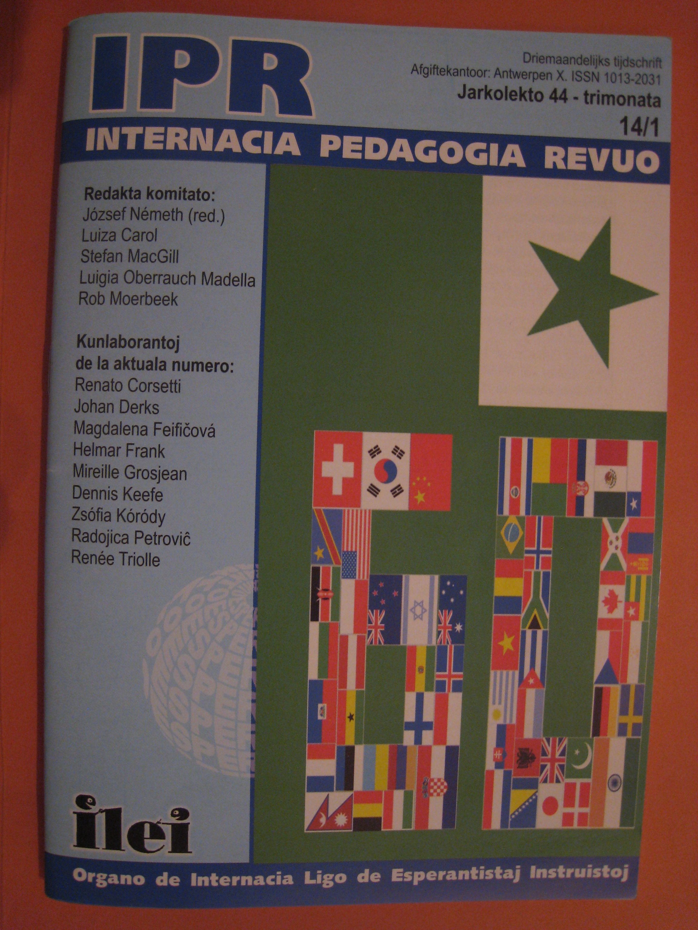 IPR, die Fachzeitschrift des Verbandes der Esperantolehrer